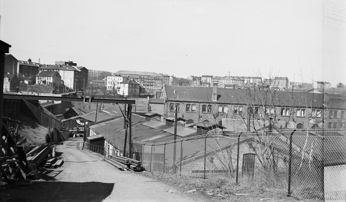 Bentse bruk, fabrikkbygninger, bygårder, boligblokker, Sandakerveien, Hammergata, Bentsebrugata, Bentsegata